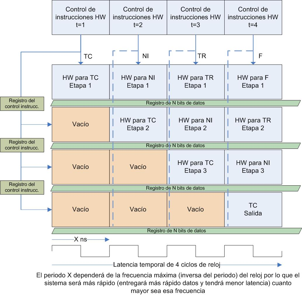 Diagrama temporal de un pipeline o segmentación HW